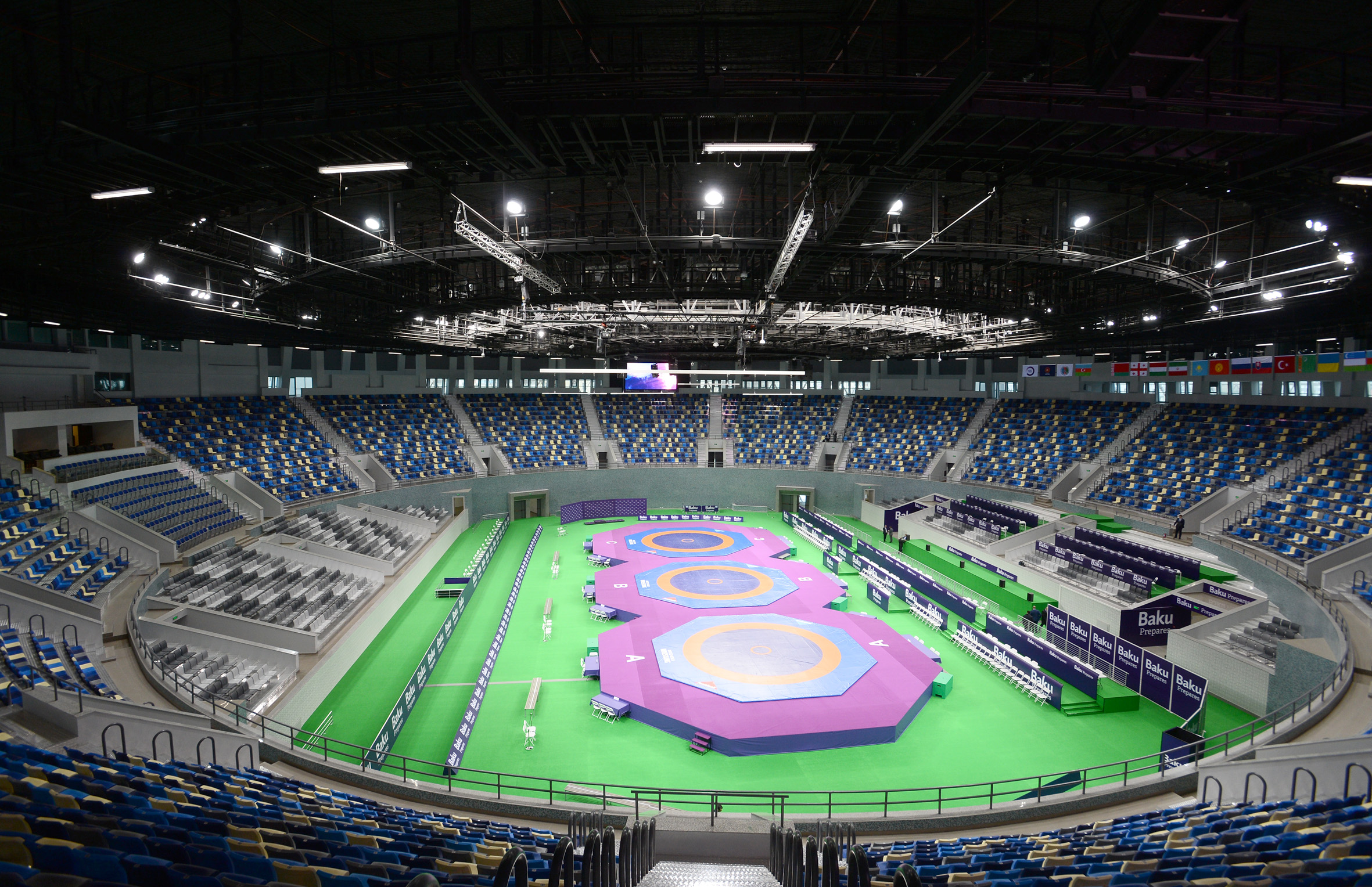 Heydar Aliyev Sports and Exhibition Complex